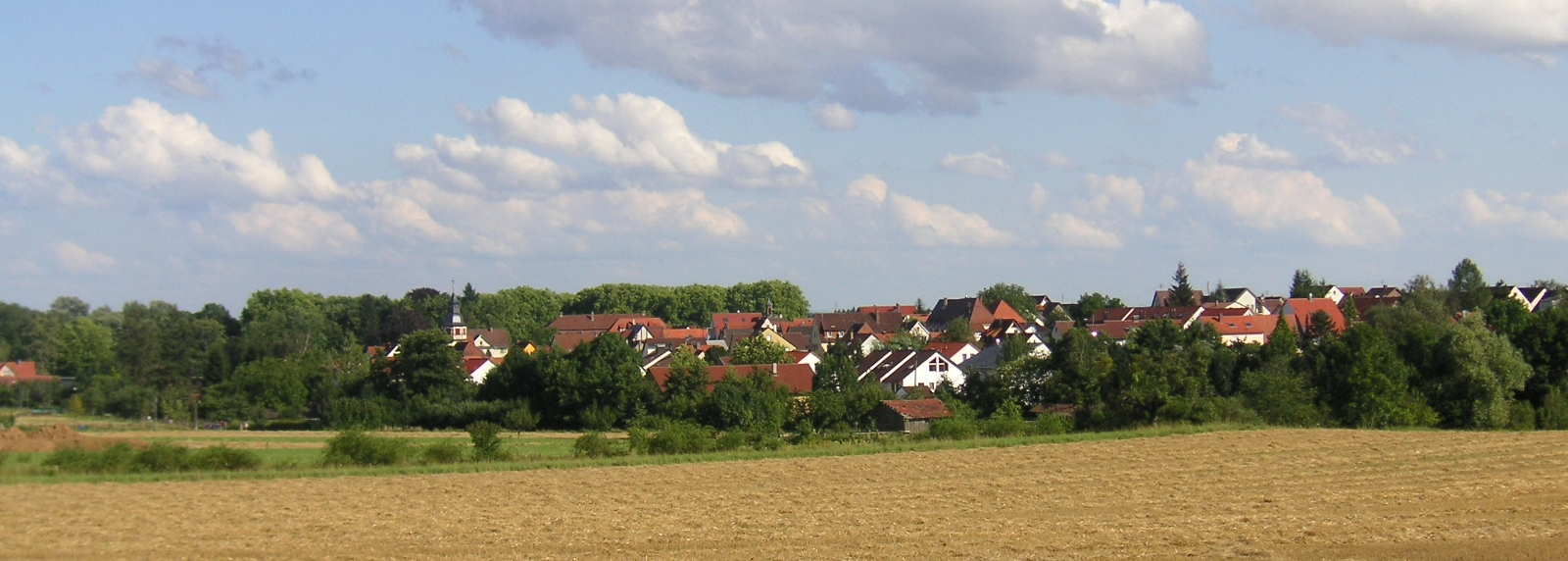 Panorama von Freudental, Kreis Ludwigburg aus der Richtung des jüdischen Friedhofs